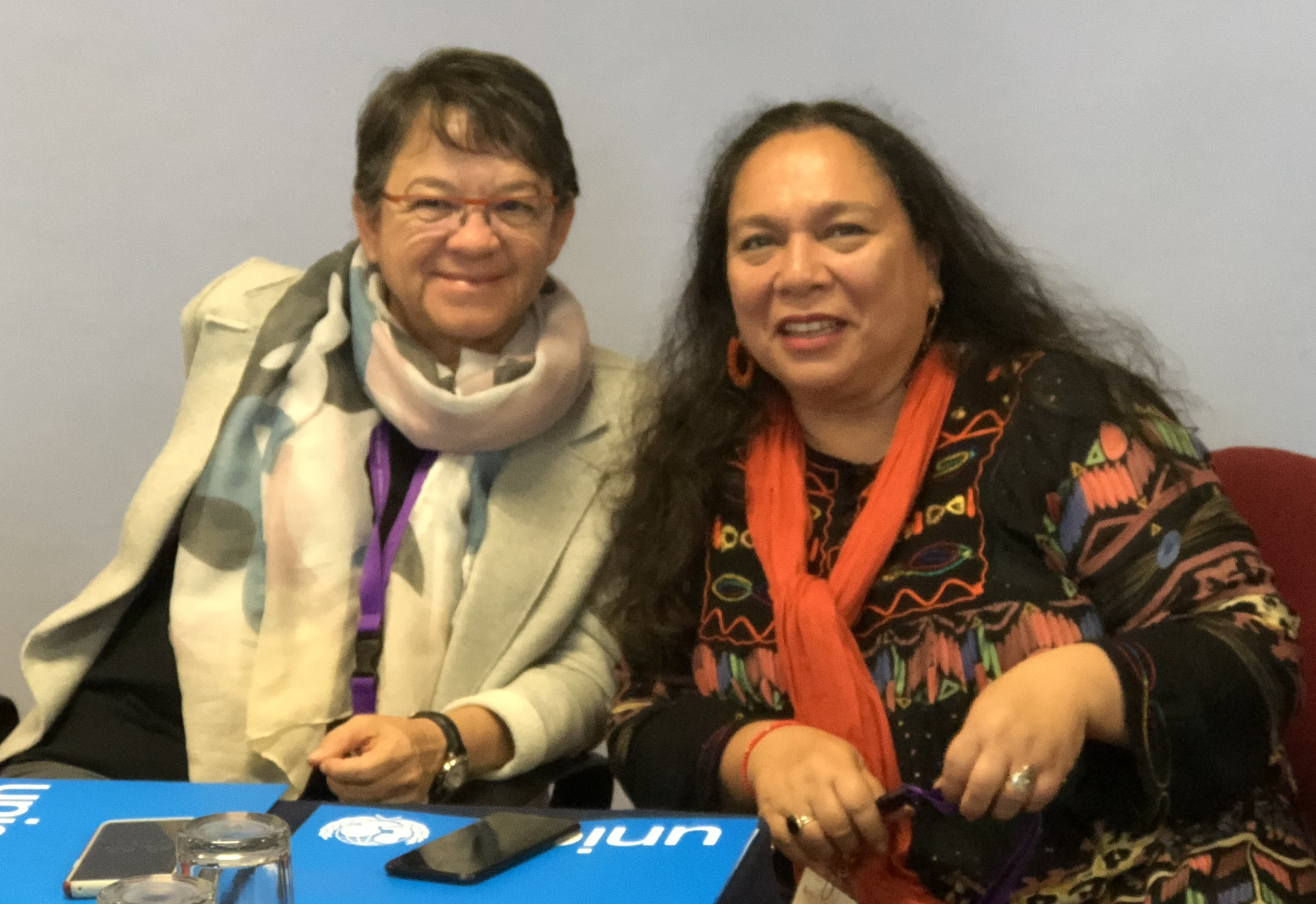 Reunión internacional de UNICEF América Latina en Guatemala